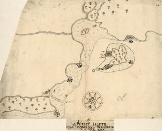 "La petite islete de Ste Marie où l'on carène les vaisseaux", dessin à la plume, encre de chine et lavis d'encre, collectionneur Roger de Gaignières (1642-1715)